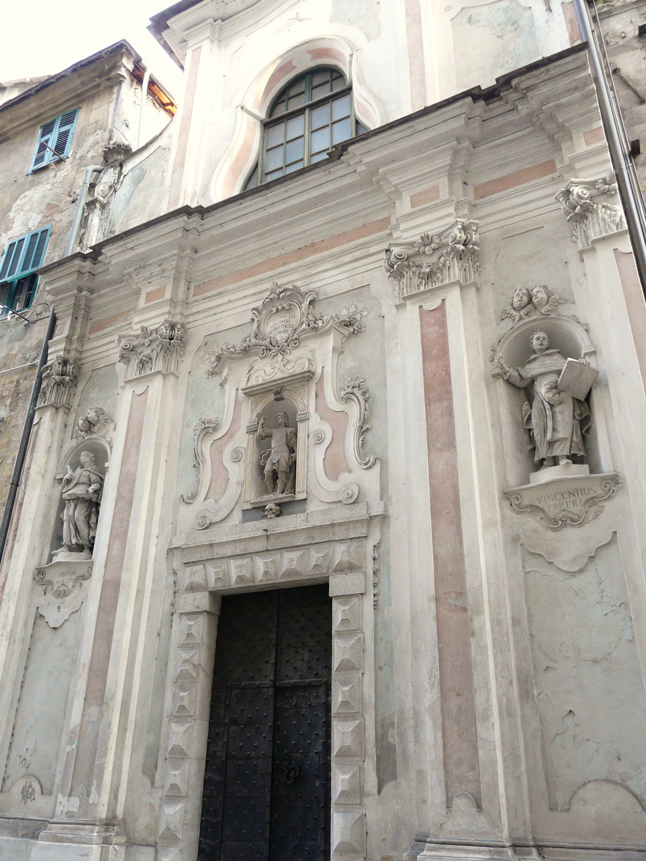 Oratorio dei Neri, Ventimiglia Alta, Liguria, Italia